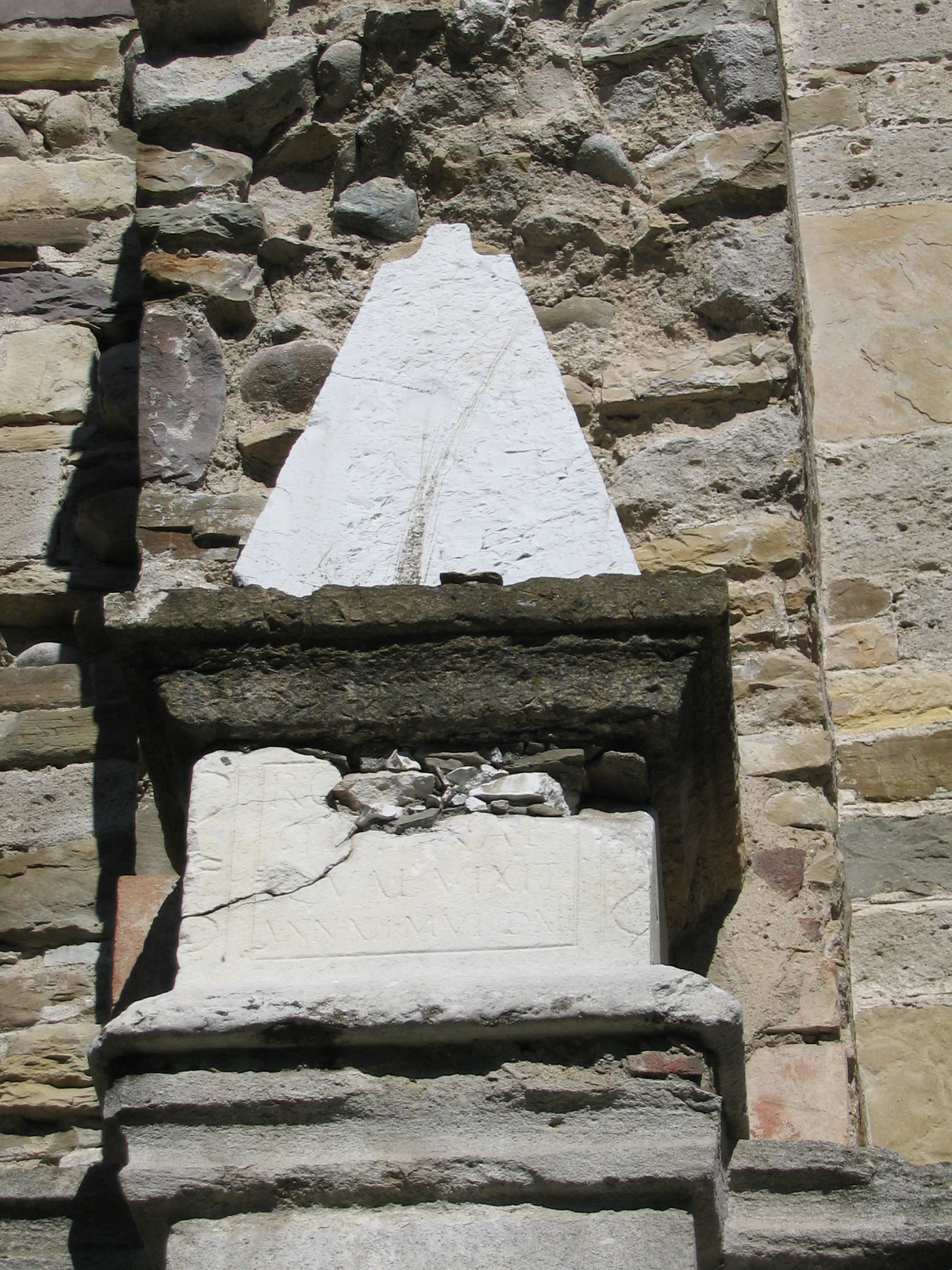 Basilica di Santa Giulia, urna cineraria romana già contenente le spoglie della fanciulla Tiziana, nel comune di Bonate Sotto.